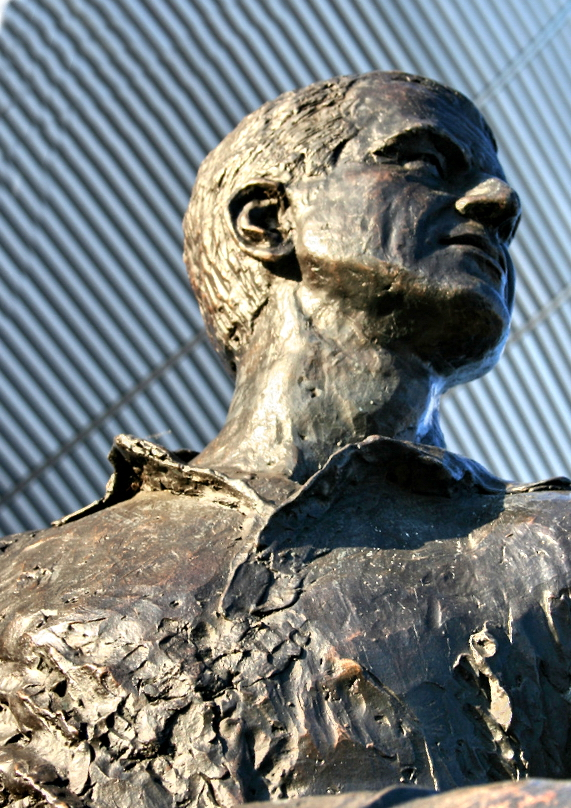 Statue of Coen Dillen in front of Philips Stadion, Eindhoven Coen Dillen (1926 - 1990) is met 43 doelpunten in één seizoen recordhouder in de ere-divisie van het betaalde voetbal. Dillen maakte zijn goals in het seizoen '56-'57 in het shirt van PSV. meer info over Coen Dillen